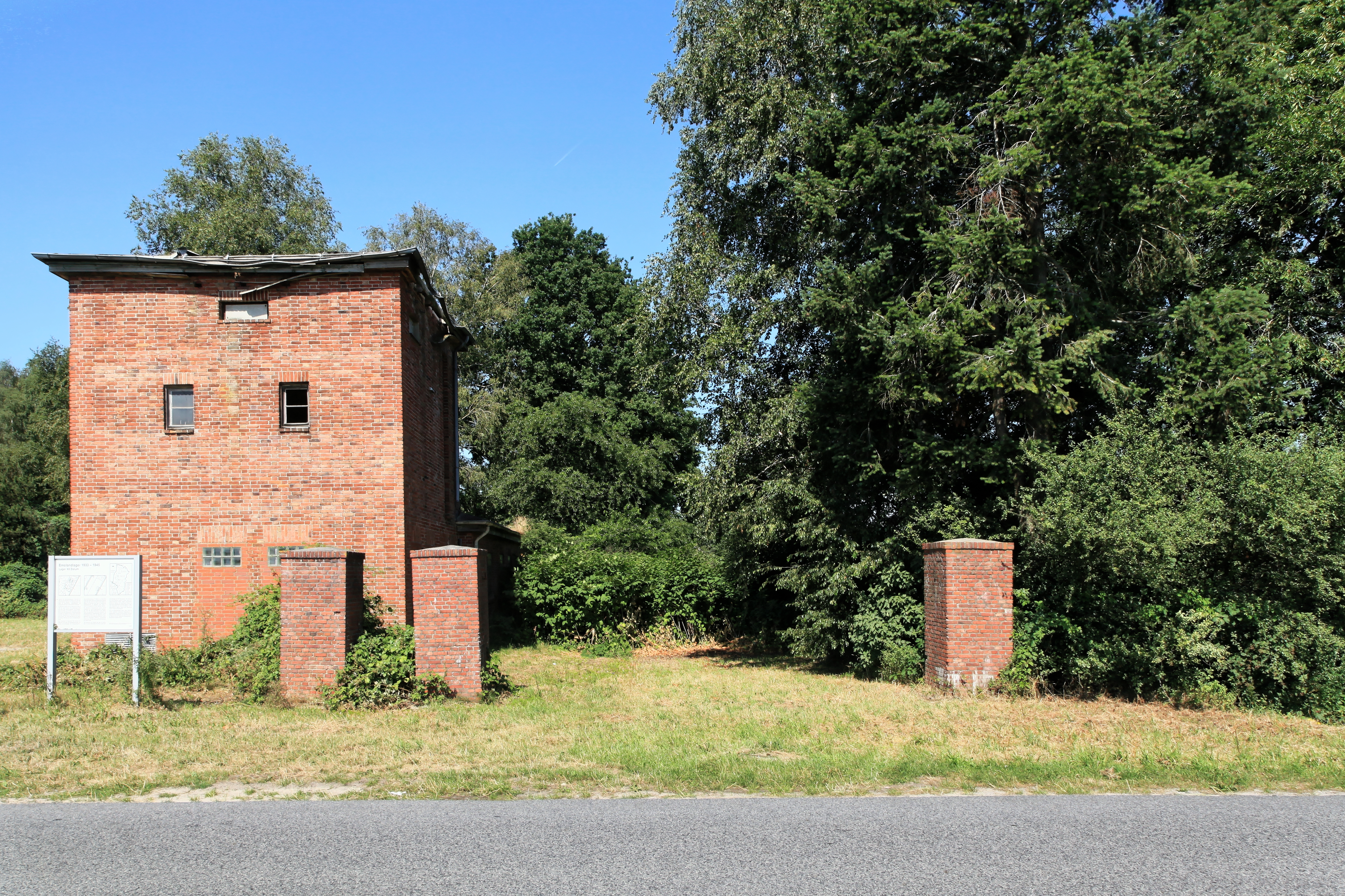 Ehemaliges Emslandlager Dalum, Am Wasserwerk in Geeste